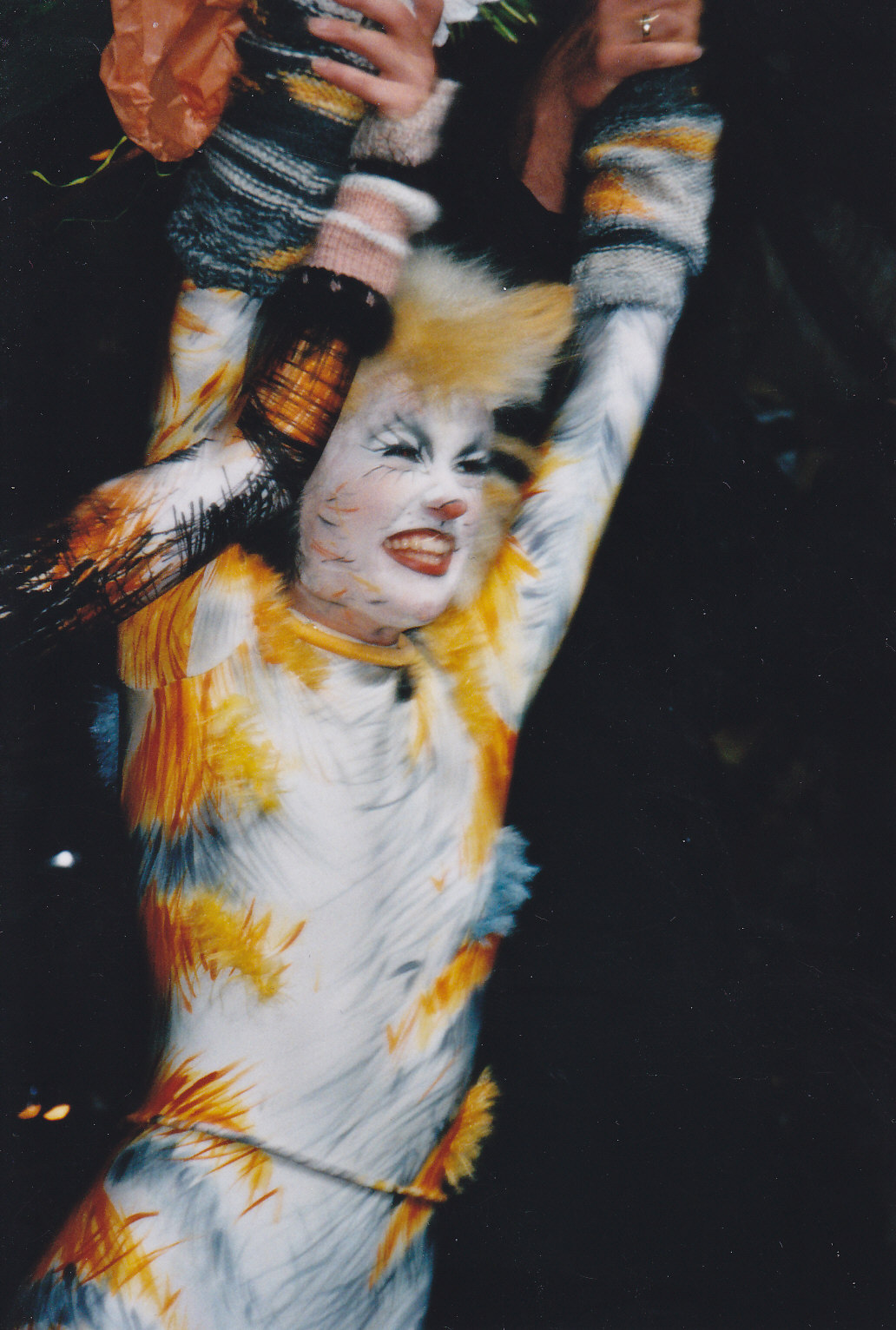 Lucy von den No Angels als Darstellerin im Musical Cats